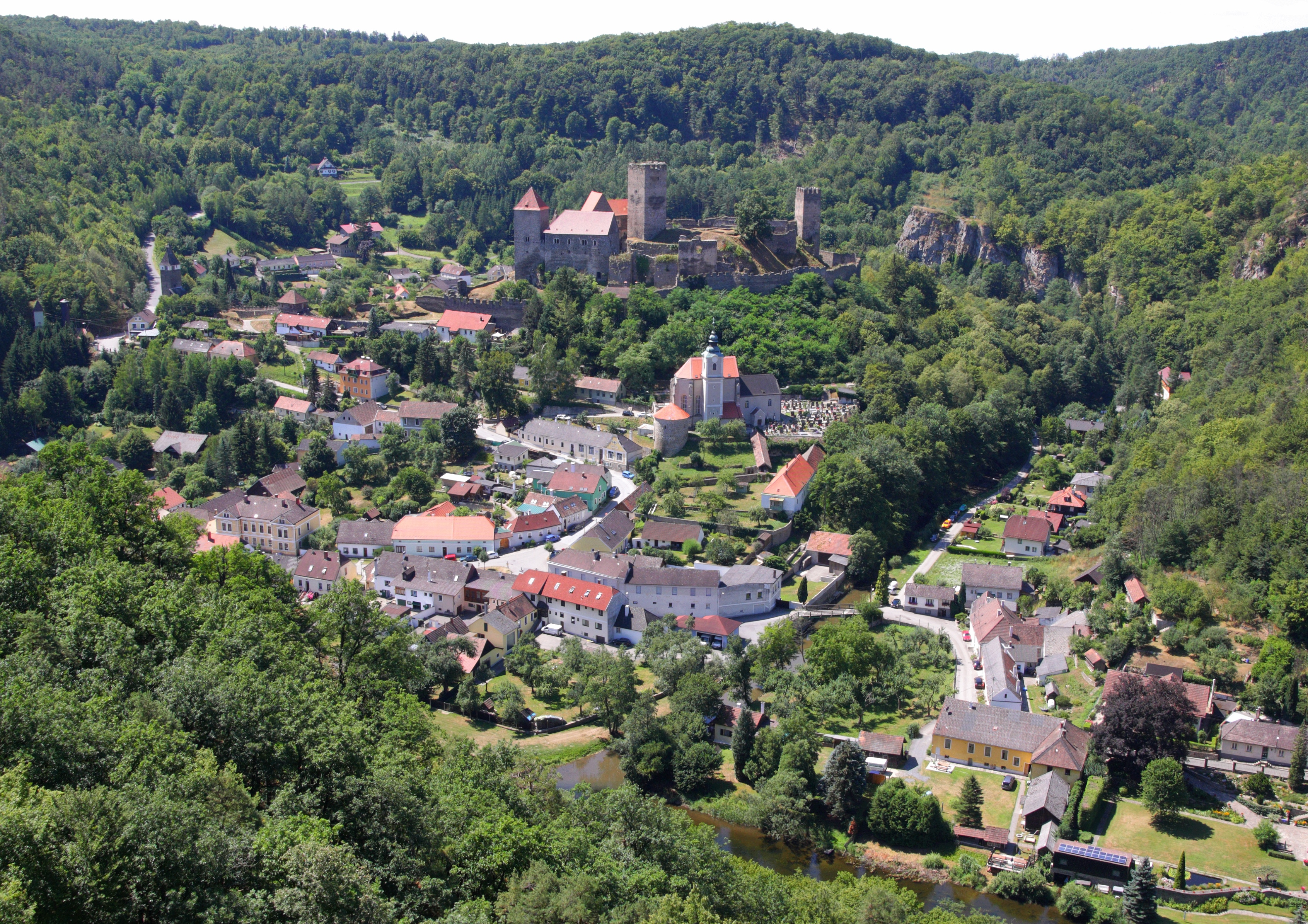 Hardegg - view from Hardegger Warte.